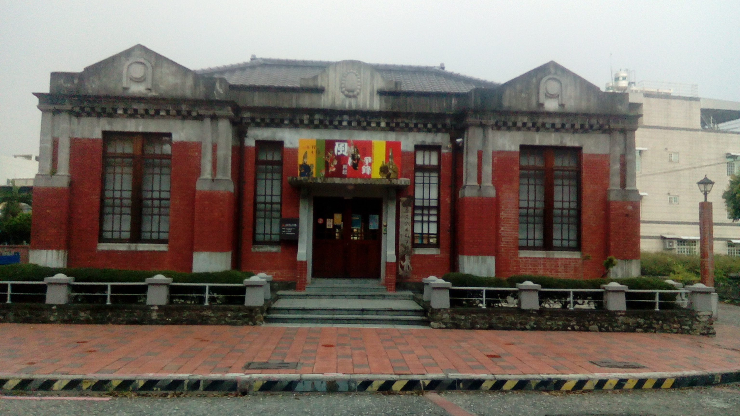 位於潮州建基路及南進路口 成立於2011年12月9日，目的以展覽與發揚在地傳統戲劇為主